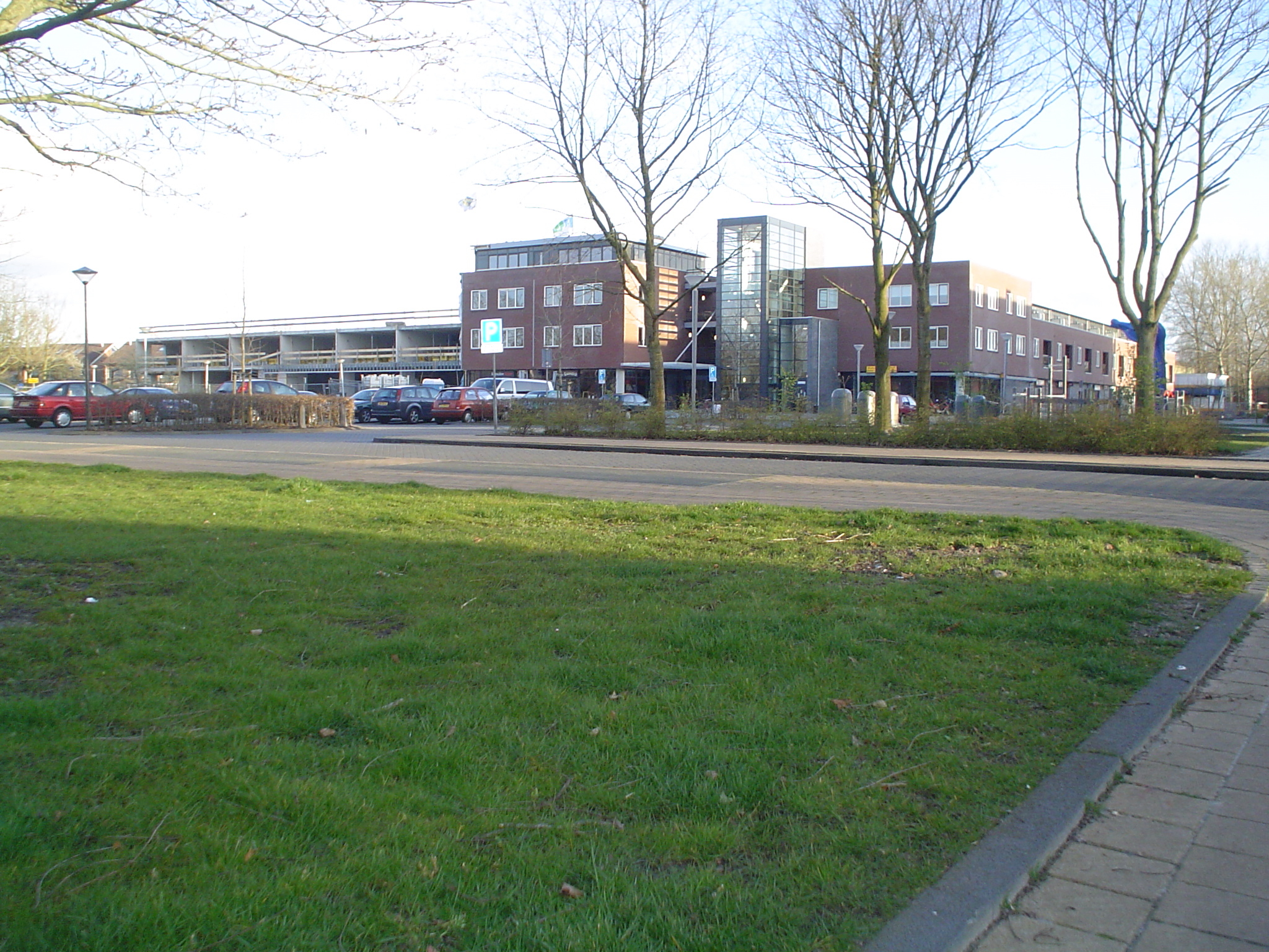 Winkelcentrum de Drait in aanbouw